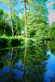 Le Lange ou l'Ange, vers l'écluse. Lieu-dit "Le Martinet", commune de Montréal la Cluse